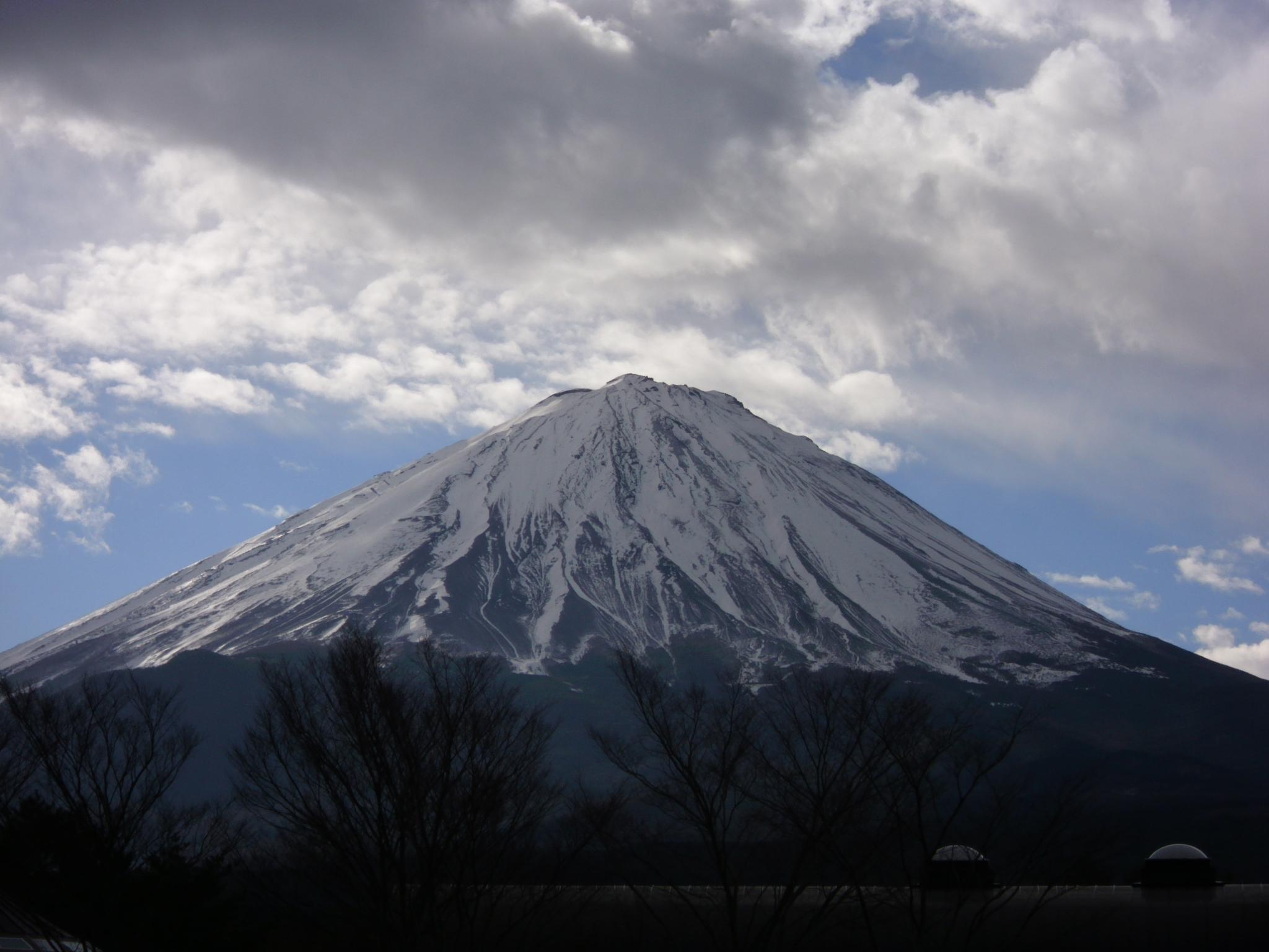 道の駅なるさわより富士山を望む